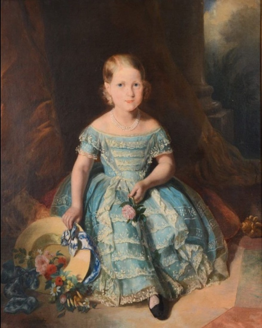 Retrato da Princesa Isabel do Brasil com 7 anos de idade.